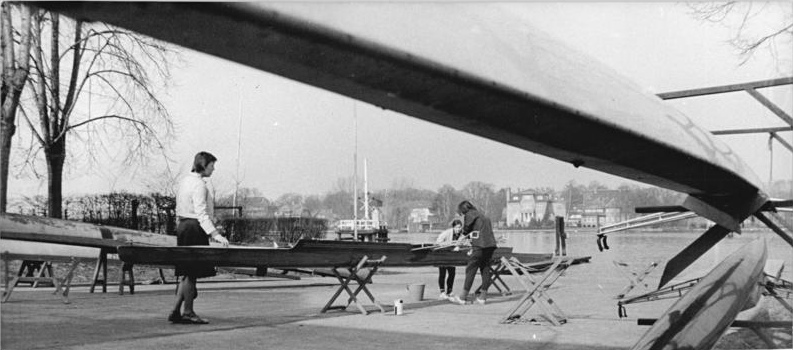 Berlin, Grünau, Bootspflege ADN-ZB Lehmann 6.3.75-str-Berlin: Saisonvorbereitungen der Rudersportlerinnen des SC Berlin-Grünau- Wenn die meisten Berliner noch nicht an Wasser und Wassersport denken, ist ihre Saisonvorbereitung bereits auf vollen Touren. Am 12.4. starten die Ruderinnen aus Grünau zu ihrem ersten Rennen der Saison in Leipzig.